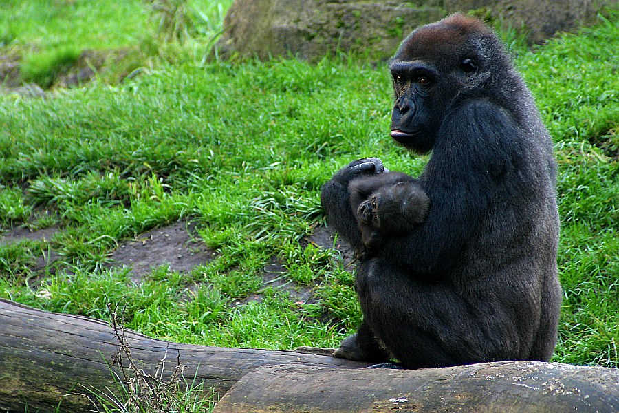 Gorilla-Weibchen mit Jungem im Zoo Hannover